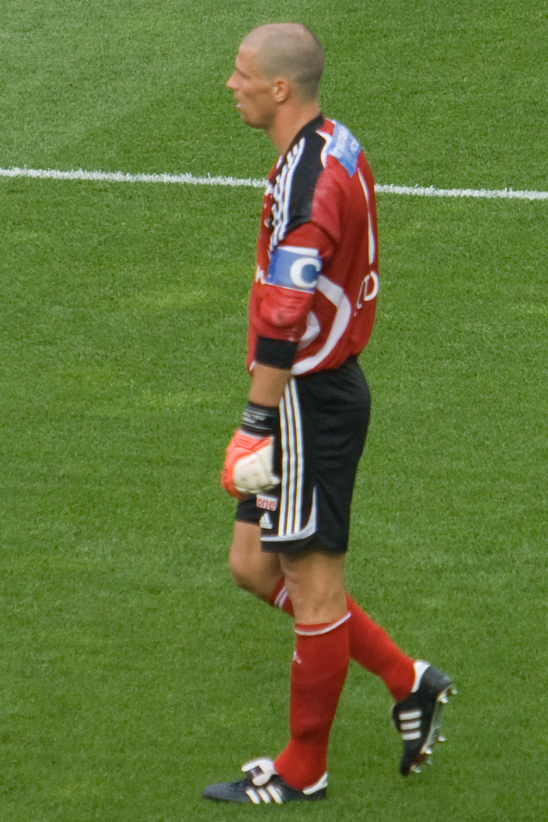 Fabio Coltorti, soccer player GC Zurich